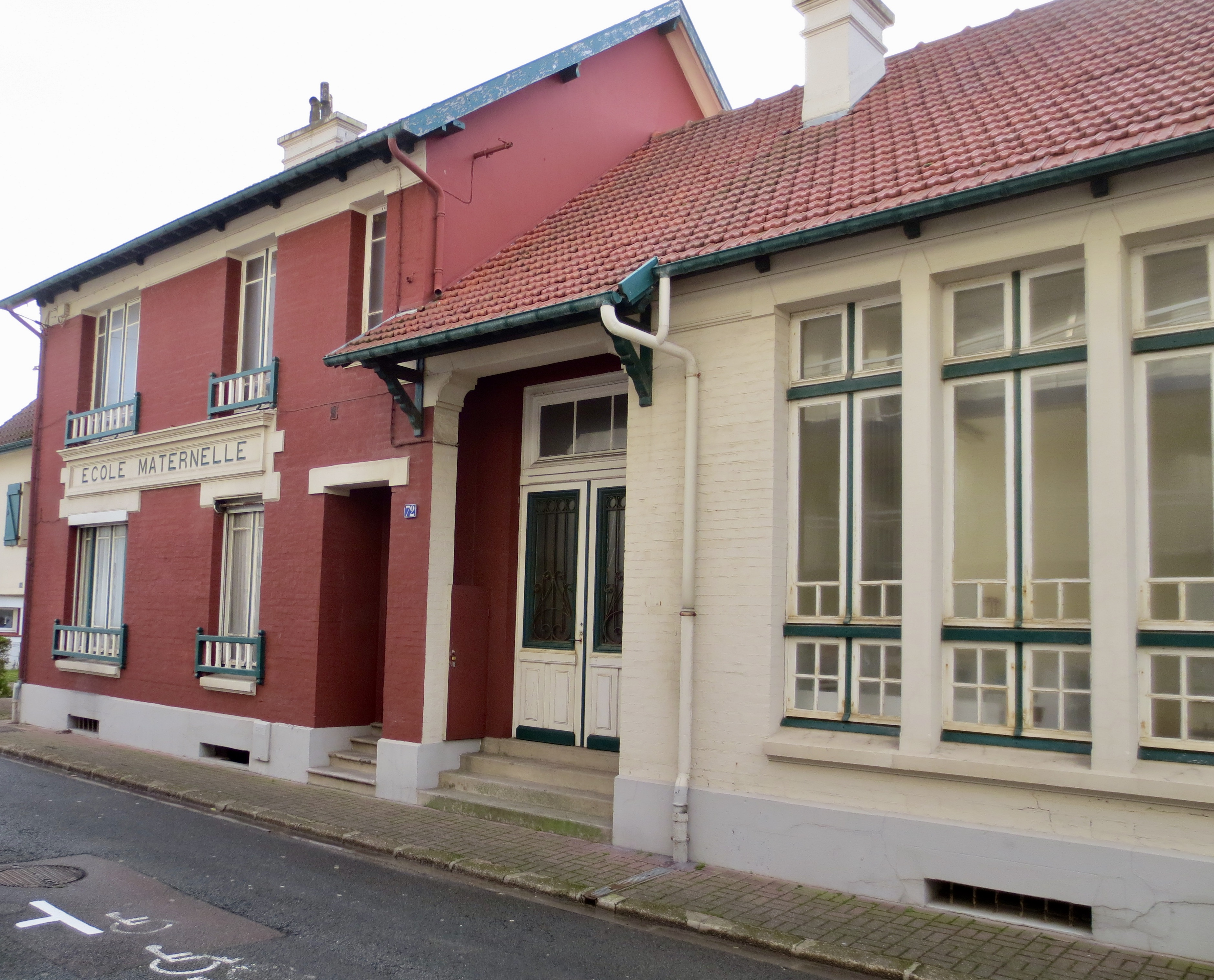 Le Touquet-Paris-Plage - École maternelle rue Léon Garet ouverte le 1er octobre 1912.